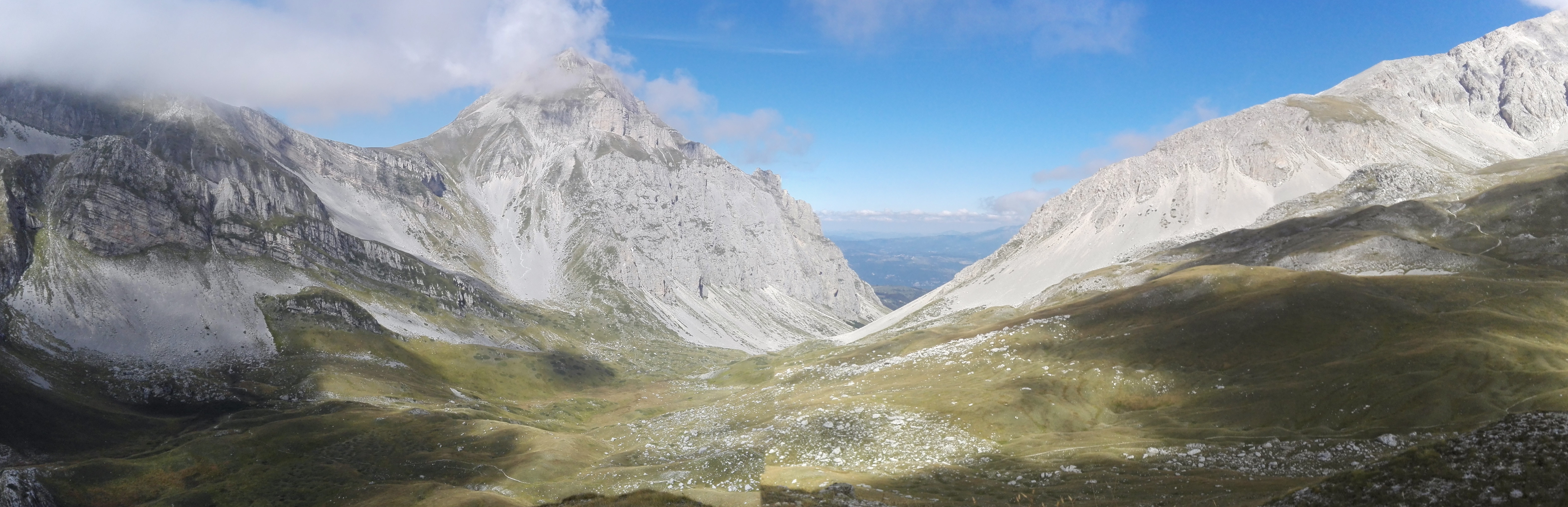 Pizzo Intersemoli visto da Campo Pericoli